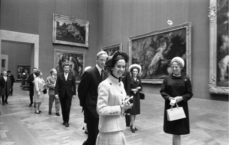 Staatsbesuch des belgischen Königspaares Königin Fabiola besucht in Begleitung des Prinzen von Hohenzollern - Sigmaringen die Alte Pinakothek München